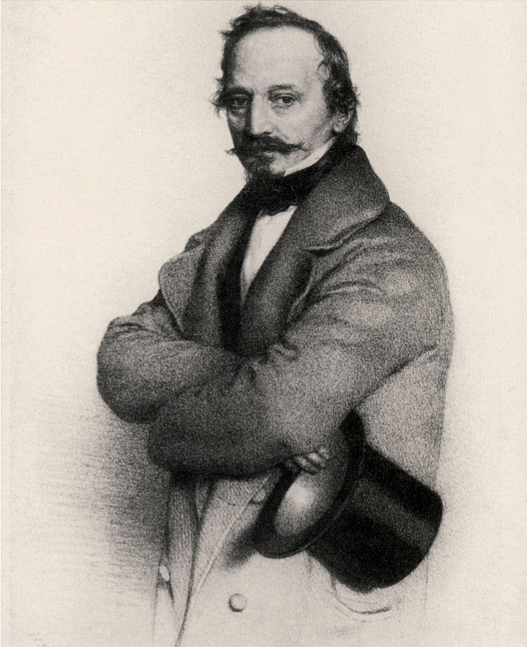 Alois Fischer, Austrian jurist